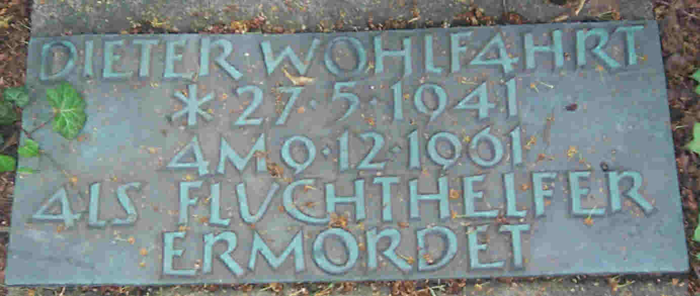 Detail vom Mauertotendenkmal für den erschossenen Fluchthelfer Dieter Wohlfahrt in Staaken (Berlin-Spandau)